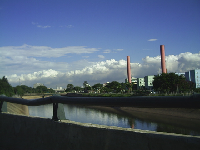 Rio Tamanduateí visto da Marginal Tietê.